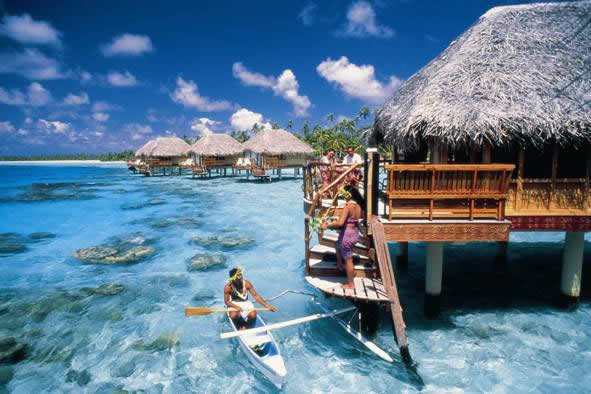 Destinos turisticos de Tahití